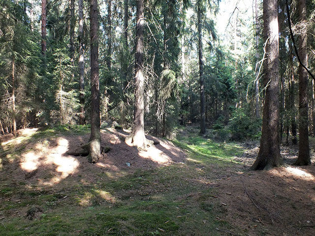 Die alte Wehranlage an der Feisnitzquelle mit Turmhügel in der linken Bildhäfte und dem Wall am rechten Bildrand.